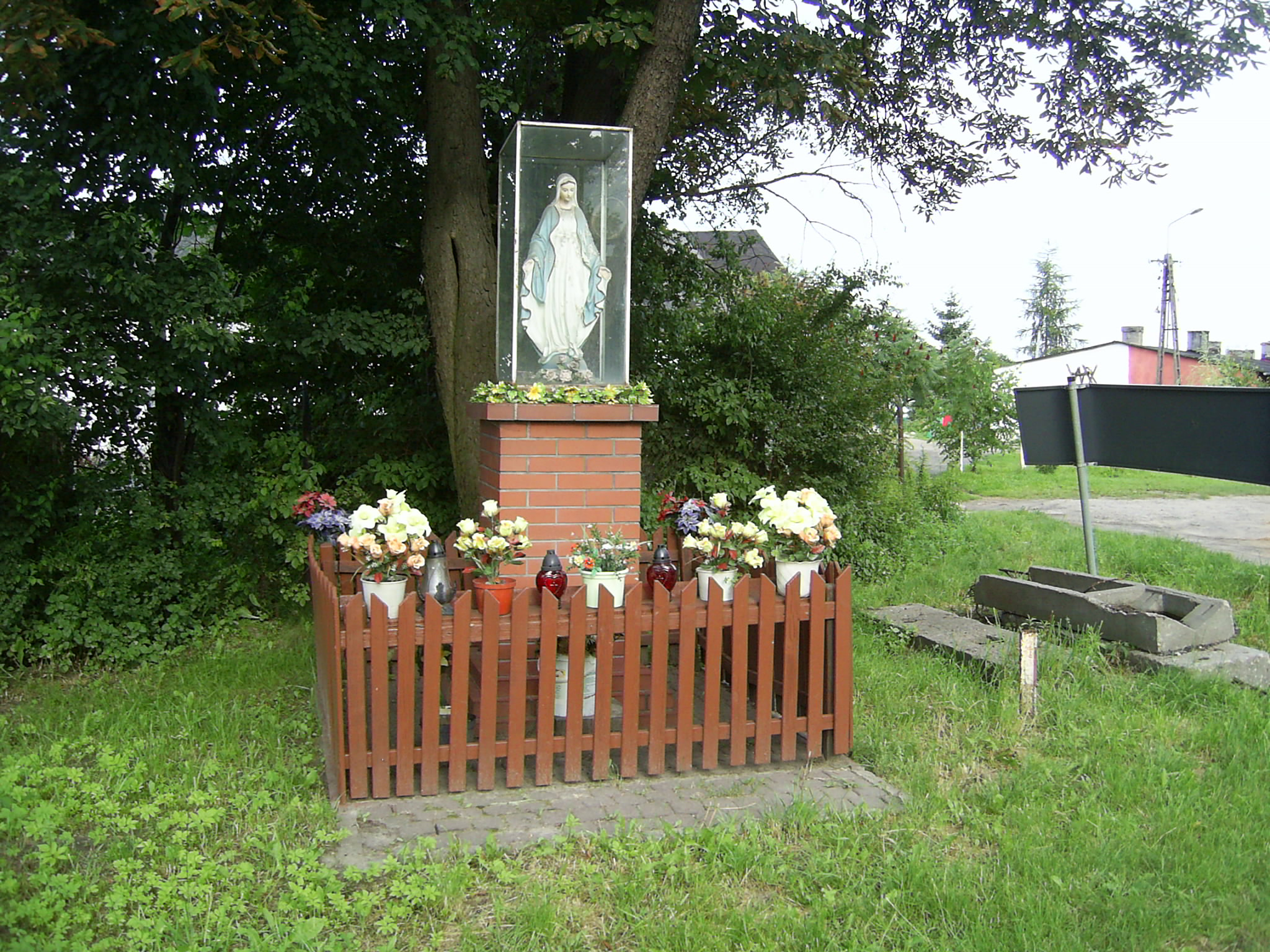 Kapliczka Matki Boskiej w Biskupicach